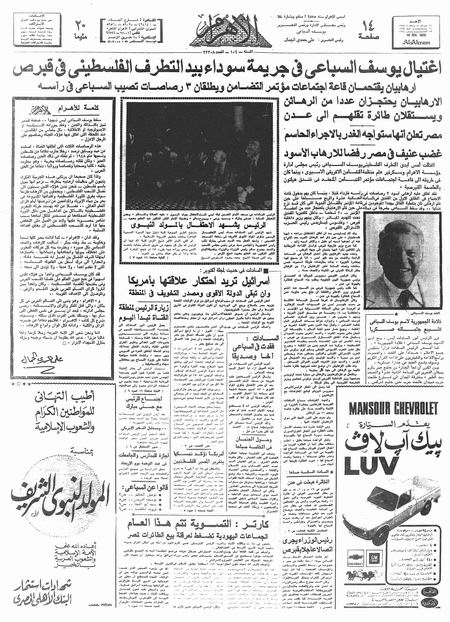 الزمن لا يتغير .. و سيبقي العرب علا حالهم حتي مقابلة المالك الحقيقي لزمن.